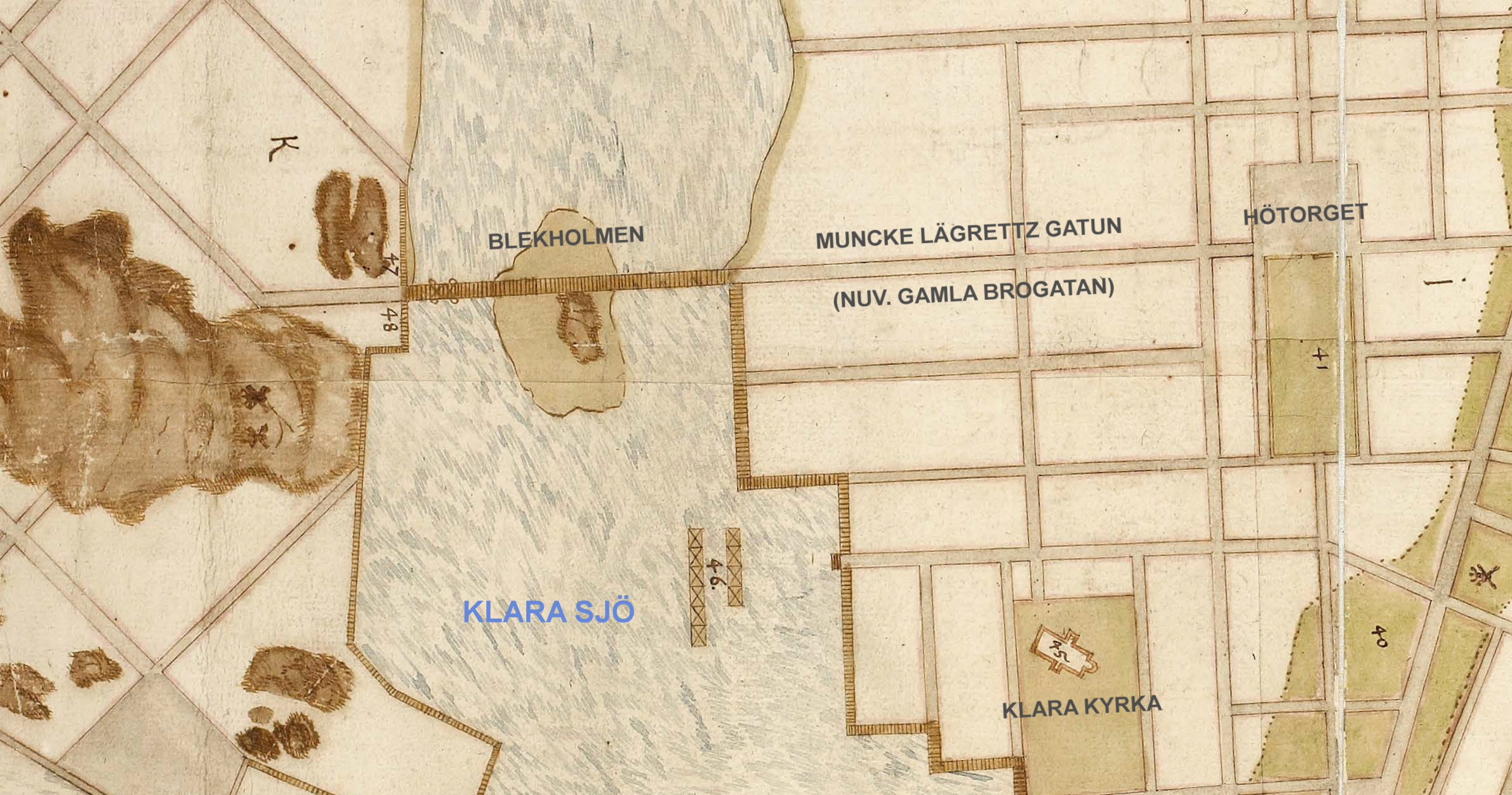 Del av Dansk 1640-talskarta över Stockholm visande Gamla Brogatan